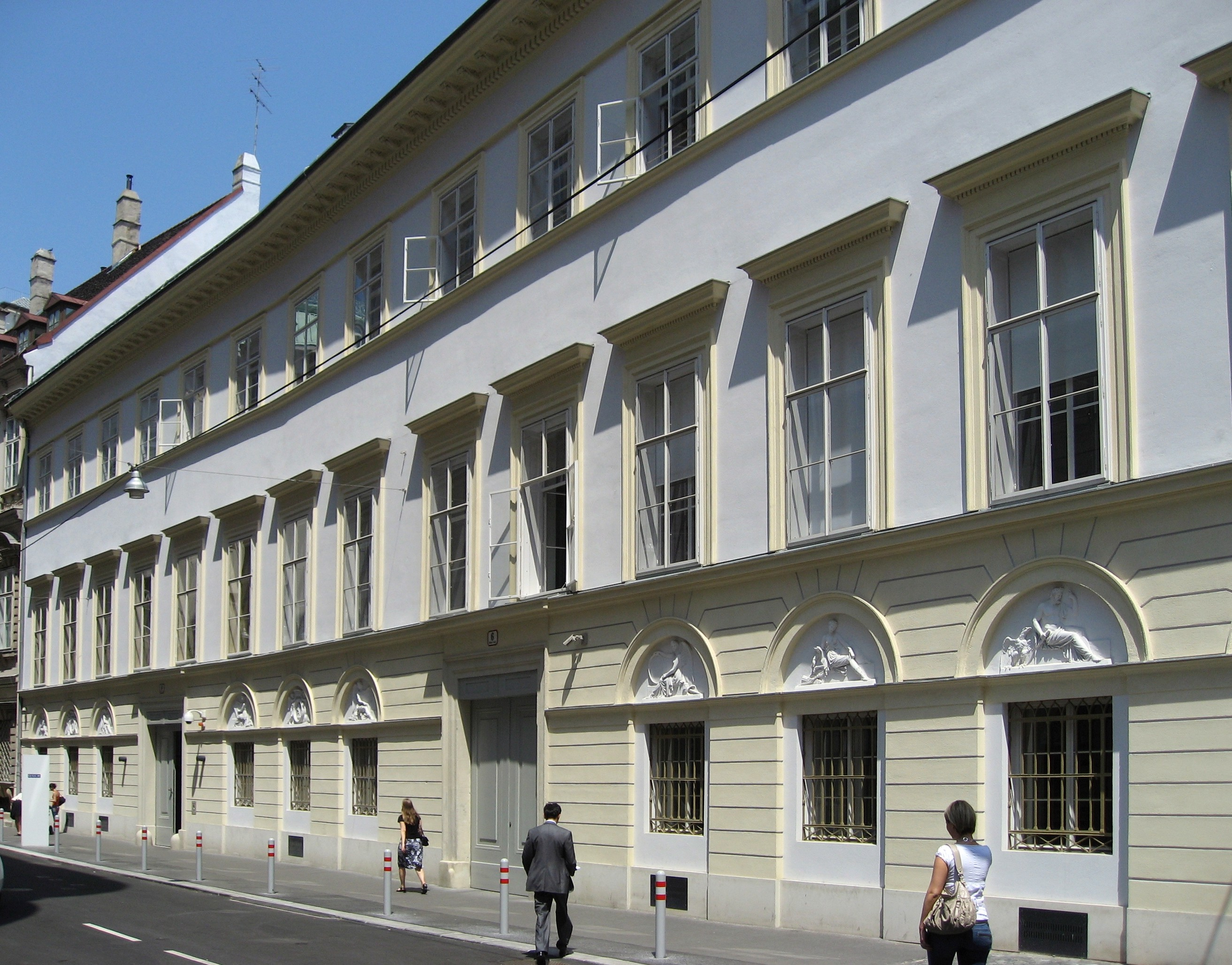 Palais Pálffy, Wallnerstraße, Wien